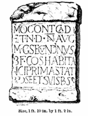 Altar für den Gott Mogons Cad (...) und dem vergöttlichten Augustus, von Marcus Gavius Secundinus, Benefizarier des Statthalters, gefunden im Fluß Rede bei Risingham, vor 1599.